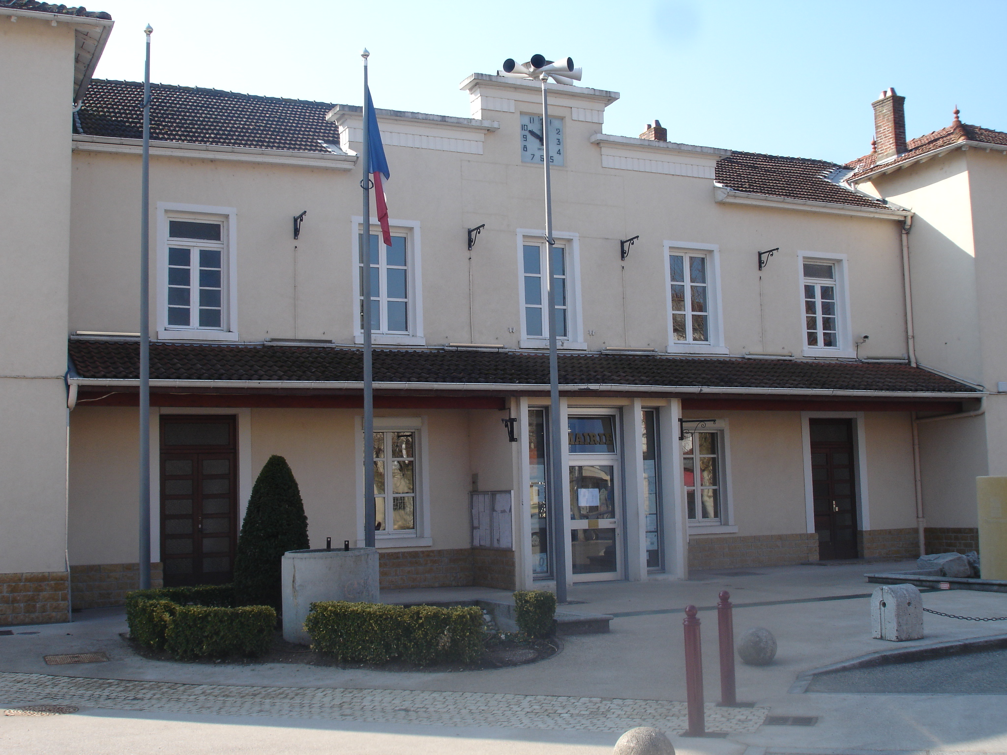 Toussieu (69) : La Mairie